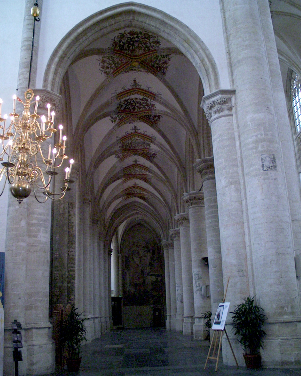 Interieur Grote Kerk Breda in Breda